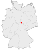 140px-Karte Nordhausen in Deutschland